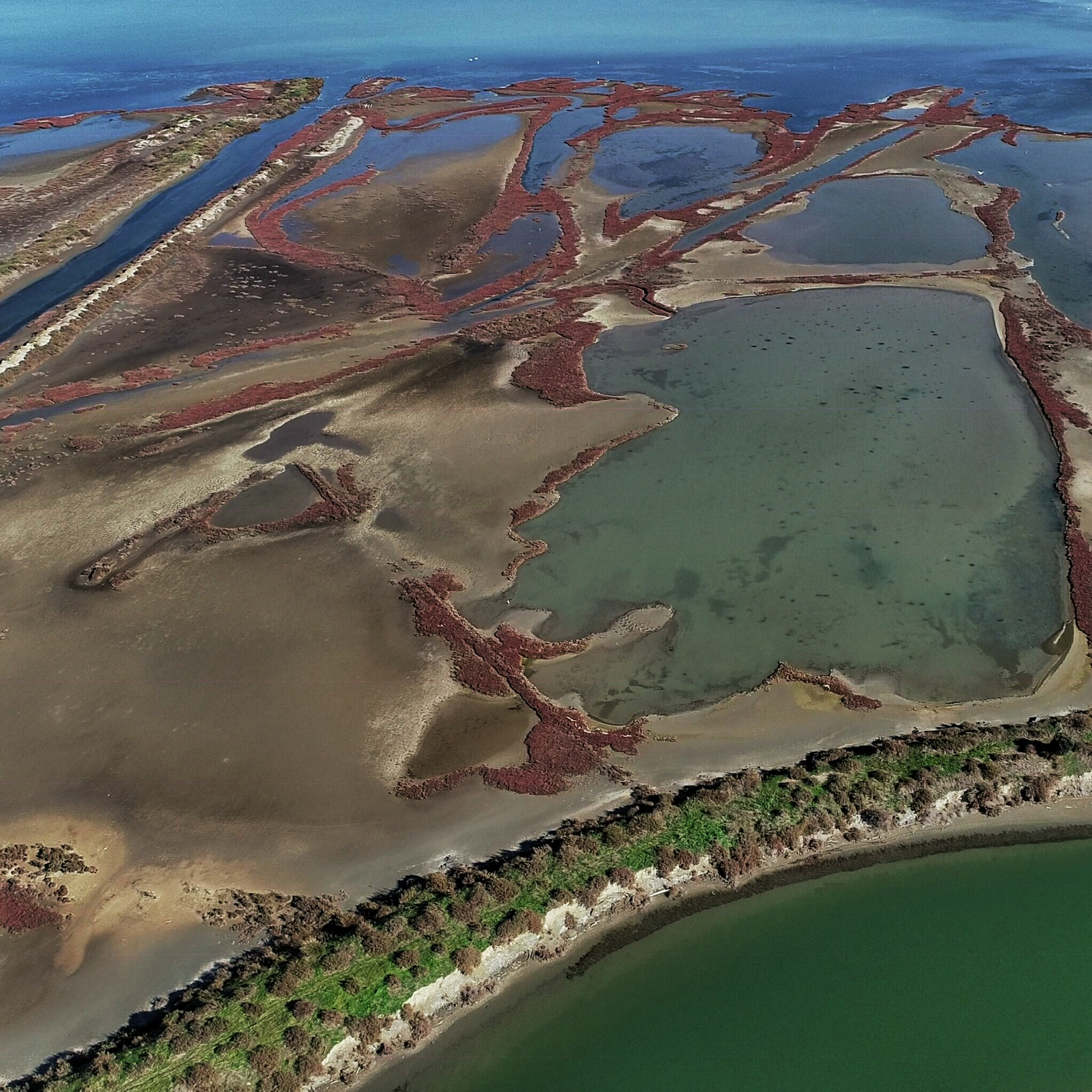 Διαφορετική οπτική απο drone This is a photography of Natura 2000 protected area with ID GR2310001